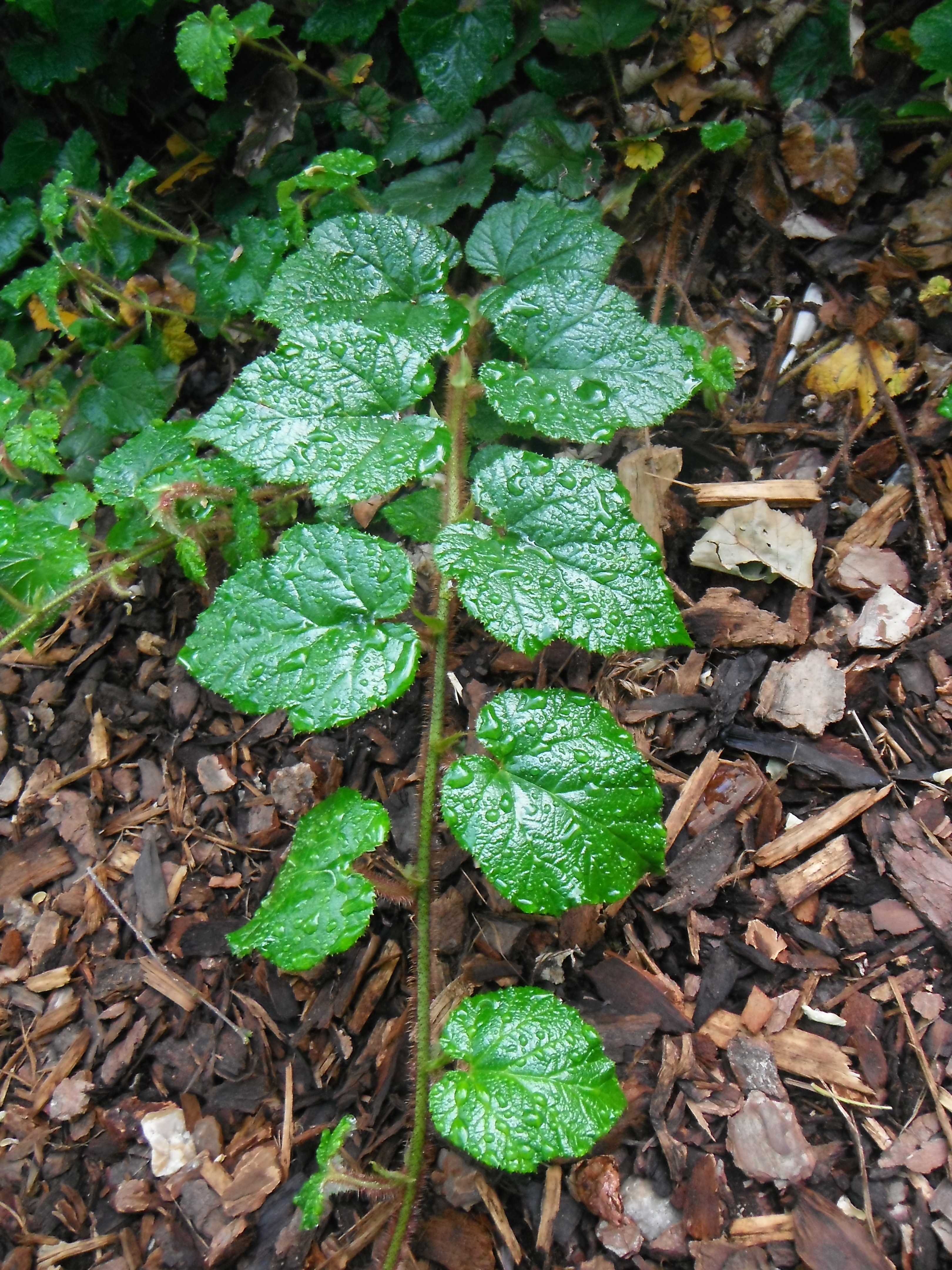 face supérieure d'un turion de Rubus tricolor